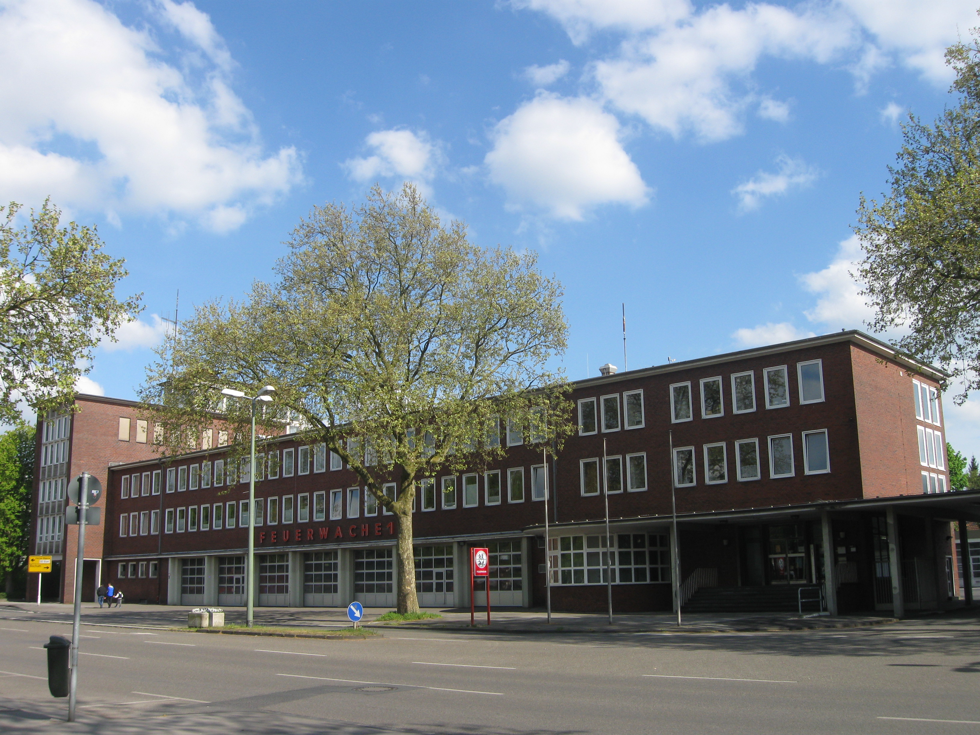 Gelsenkirchen Feuerwache 1 (Wildenbruchstraße), errichtet in den 1950er Jahren, Hauptwache der Stadt bis 2005 (Einweihung der neuen, zentralen Feuer- und Rettungswache 2 an der Seestraße)